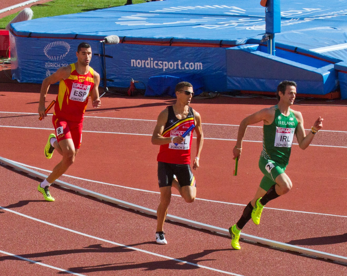 990354 4X400m borlee